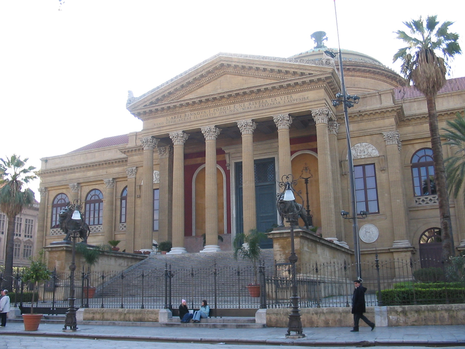 Teatro Massimo, Palermo, Sicily